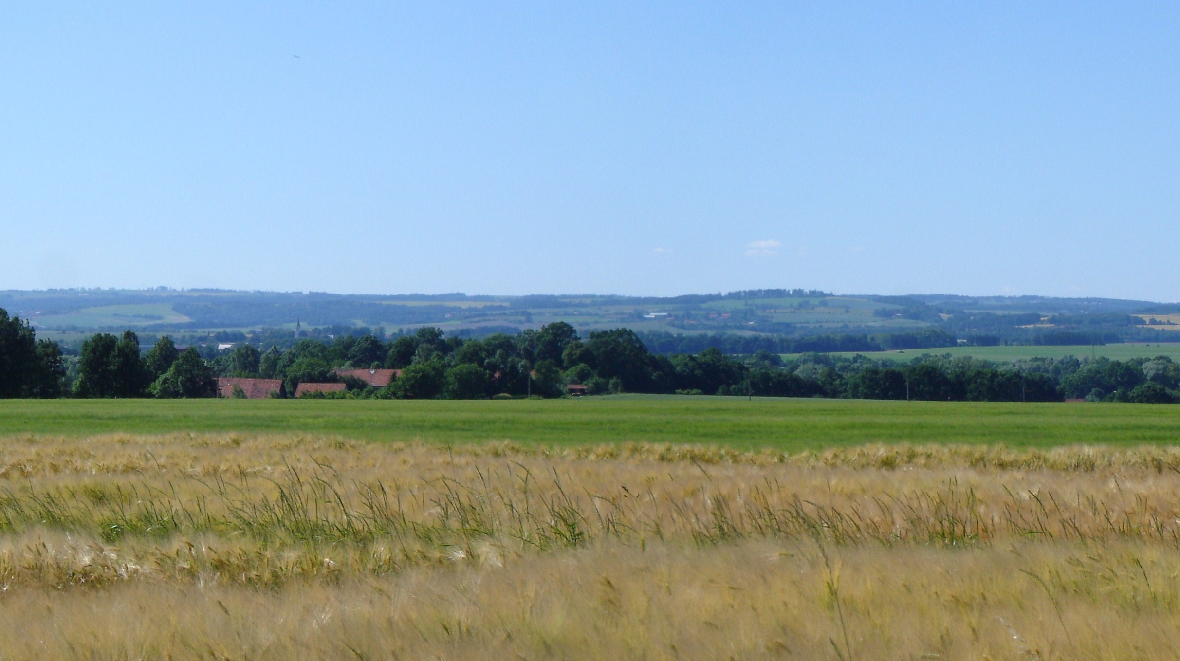 Blick auf Felds neben Partschendorf.